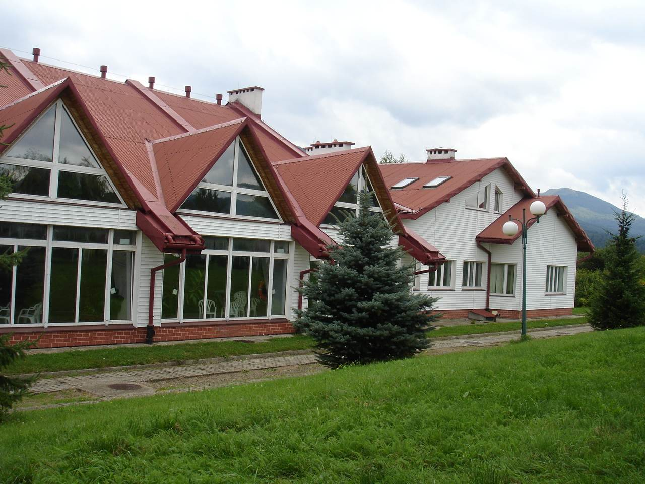 swimming poool in Smerek